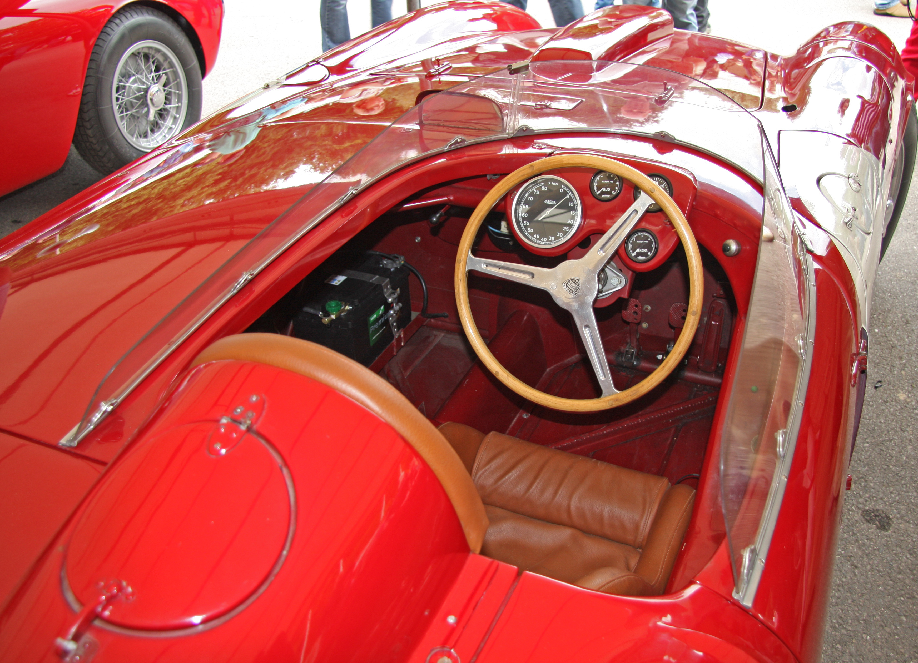 Built 1954. 3.7 litre V6